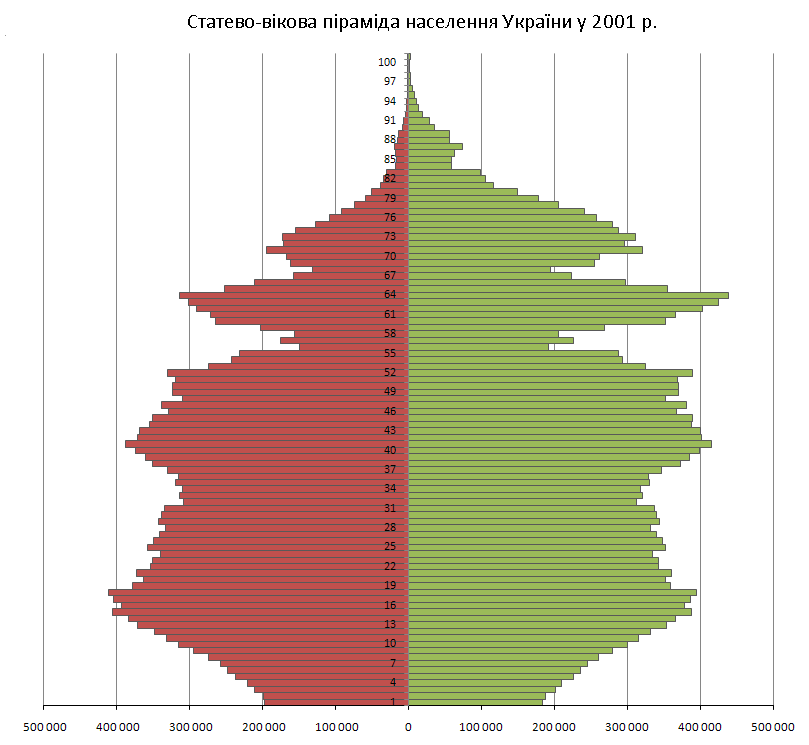 Вікова піраміда населення України у 2001 р. / Population pyramid of Ukraine in 2001